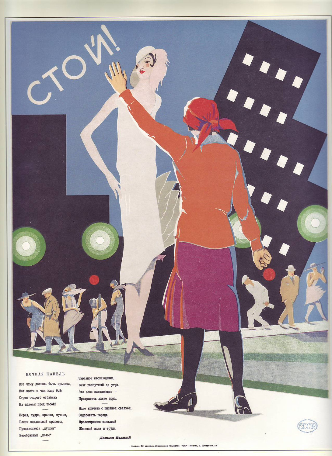 Советский плакат против проституции, 1929 год НОЧНАЯ ПАНЕЛЬ Вот чему должна быть крышка, Вот вести с чем надо бой: Строя старого отрыжка На панели пред тобой! Перья, пудра, краски, мушки, Блеск поддельной красоты, Продающиеся "душки" Безобразные "коты". Заразное наслаждение, Визг распутный до утра. Это злое навождение Прекратить давно пора. Надо кончить с гнойной свалкой, Оздоровить города Пролетарскою закалкой Женской воли и труда Демьян Бедный